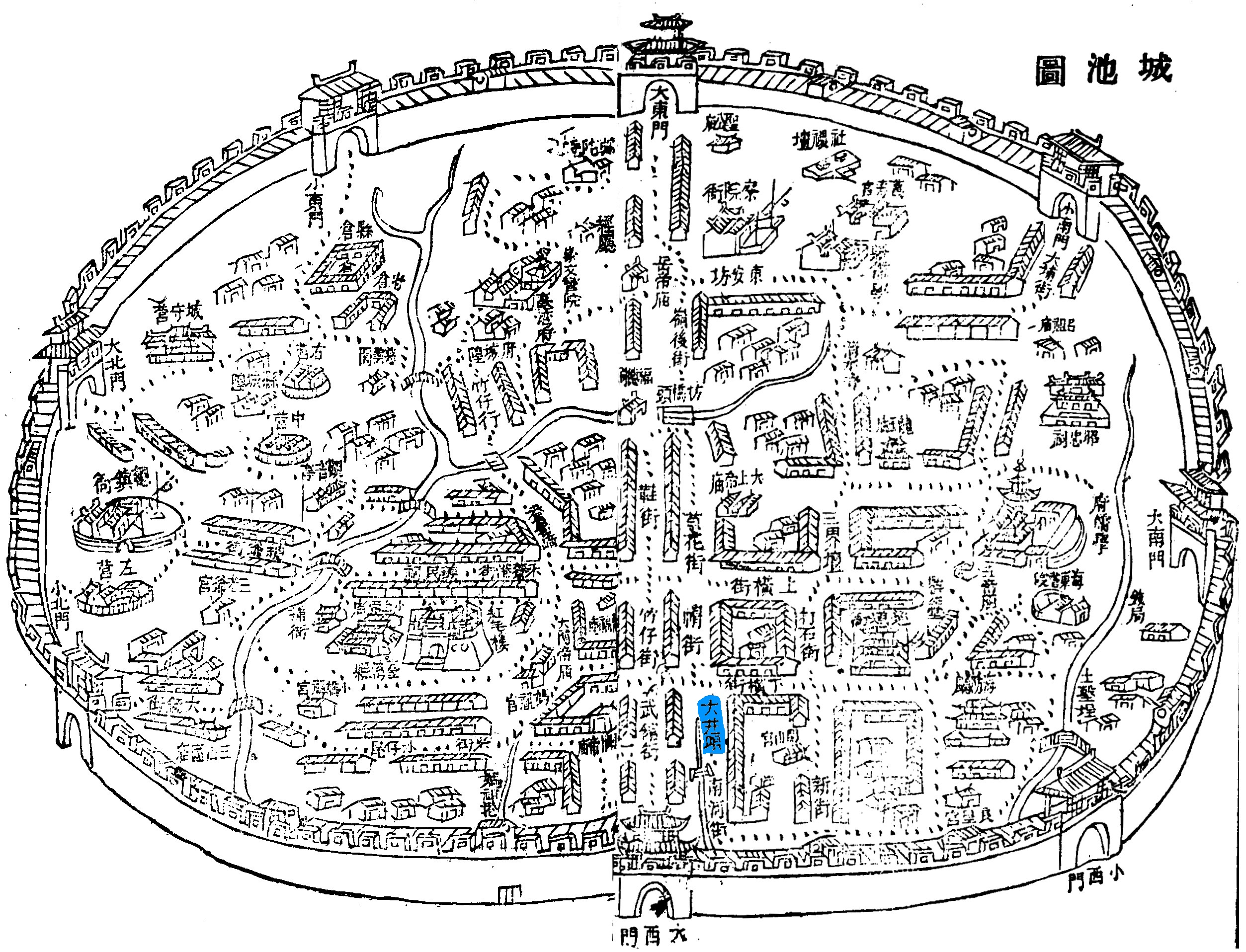 根據中文維基上此已無版權之圖的衍生作品